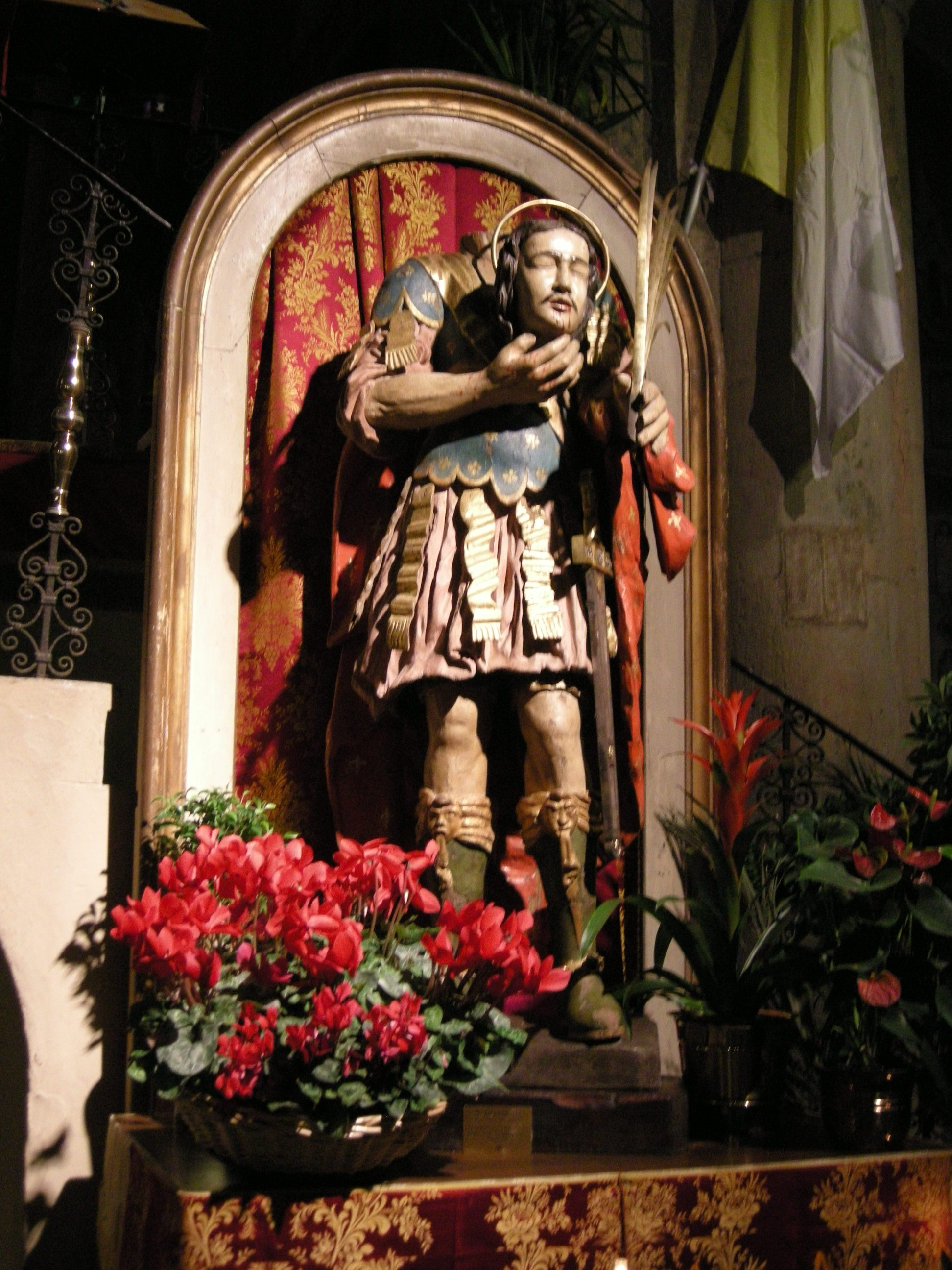 Duomo di fidenza, interno, statua di san donnino